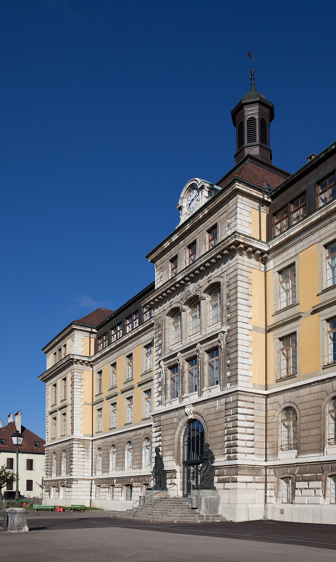 Bibliothek in La Chaux-de-Fonds